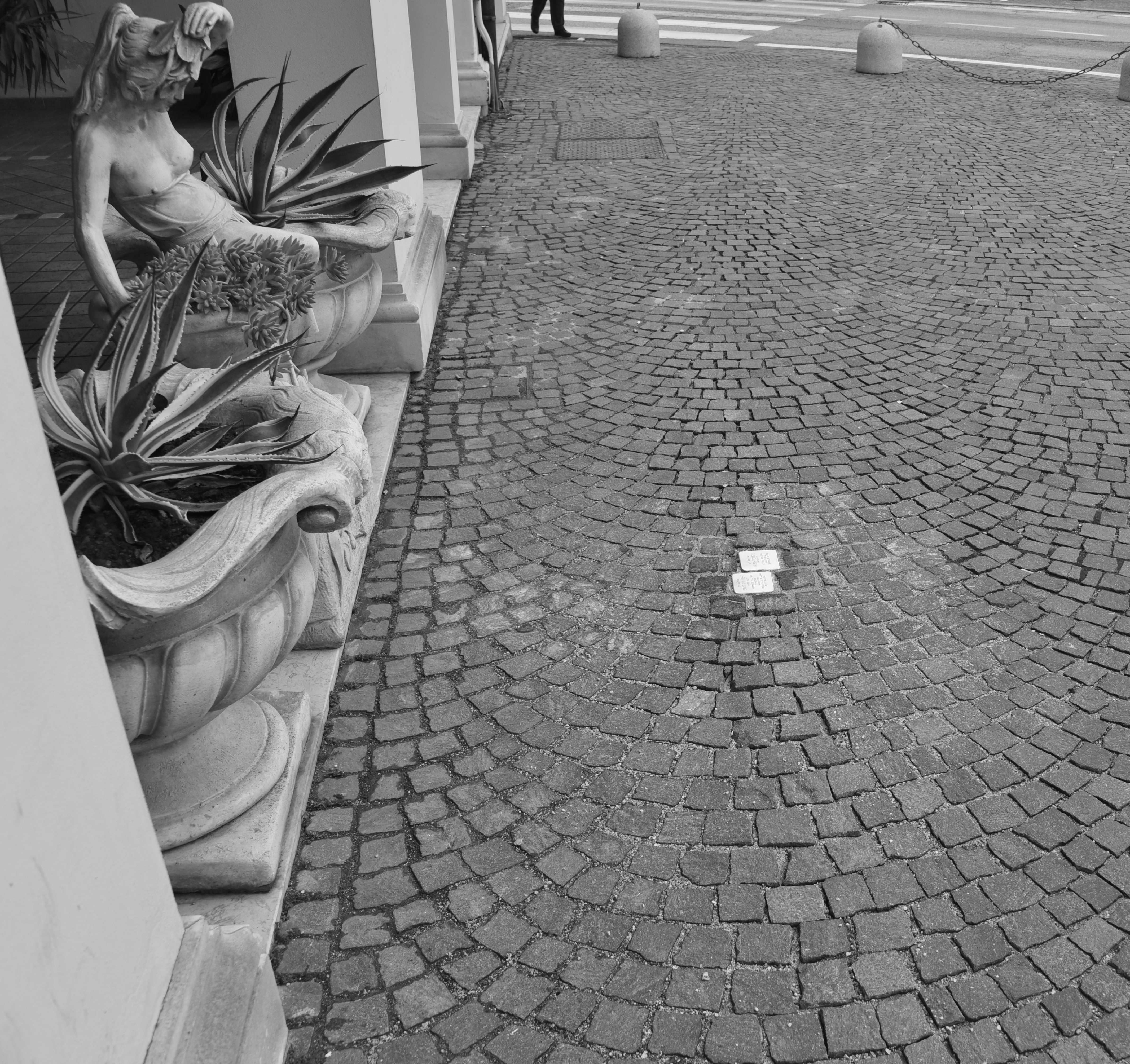 Stolperstein in Bovolenta, Piazza Accademia